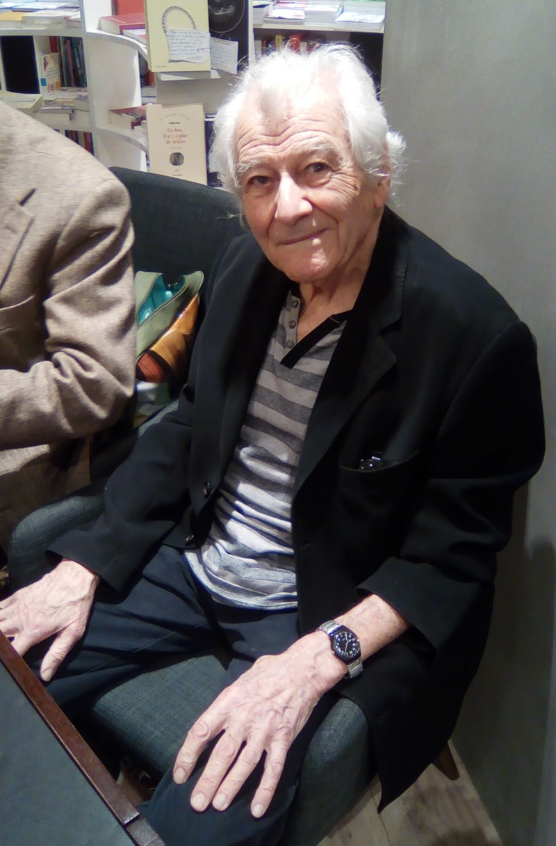 Jacques Rozier à la soirée dédicaces de l'autobiographie de Bernard Ménez.